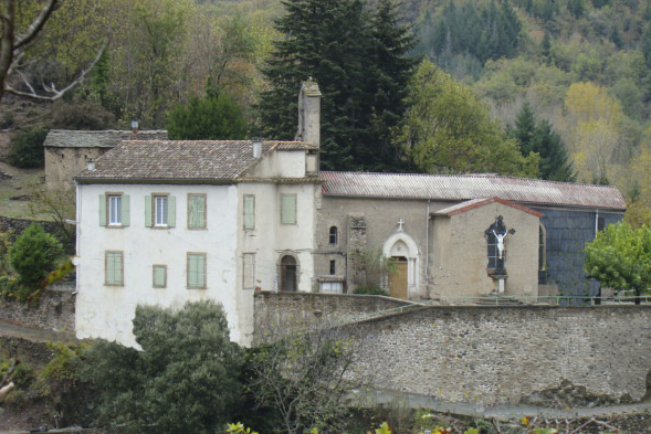 Église Notre-Dame de Castanet-le-Haut (Hérault) et son presbytère. L'église est antérieure à 1600.Le presbytère a été construit vers 1862.